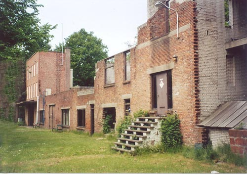 Oefenruine op Overvoorde, Rijswijk, zie Stichting_Nationale_Collectie_Bescherming_Bevolking